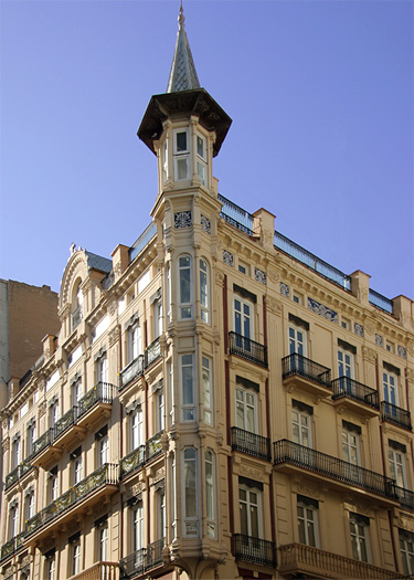 Casa Sancho, Valencia, Spain.